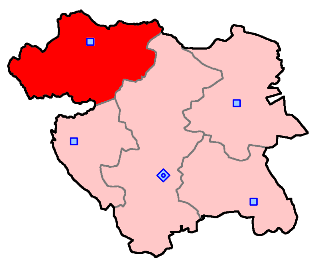 سقز و بانه برای انتخابات مجلس شورای اسلامی